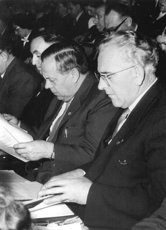 Zentralbild Löwe 1.10.1958 - 9. Parteitag der CDU eröffnet Der 9. Parteitag der CDU wurde am 30.09.58 in neuerbauten Festsaal des Deutschen Hygienemuseums in Dresden eröffnet (Näheres siehe ADN-Meldungen). UBz: Unter den Ehrengästen der Oberbürgermeister der Elbestadt Dresden, Weidauer, und der Vorsitzende des Rates des Bezirks Dresden, Rudi Jahn (vorn).